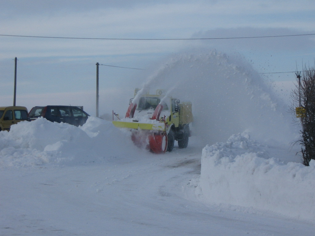 Chasse-neige à turbines en fonctionnement (Col de Bonnecombe, Aubrac, Massif central, France)